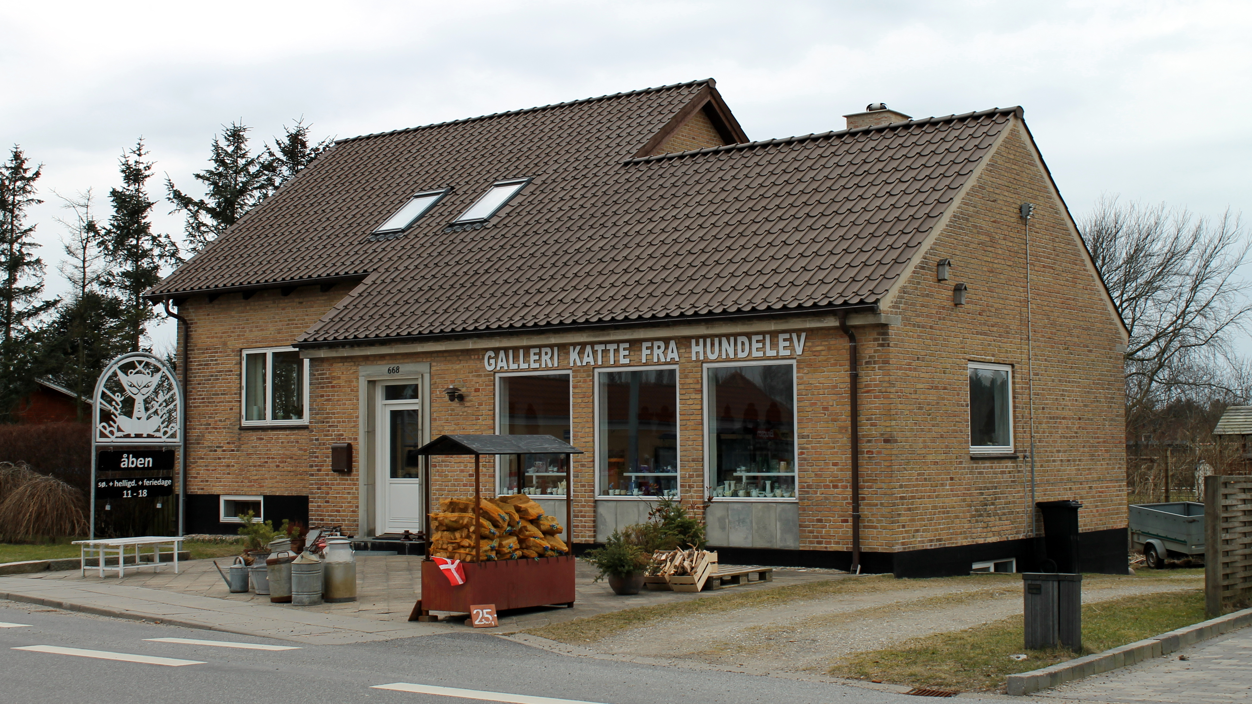 Galleri Katte fra Hundelev